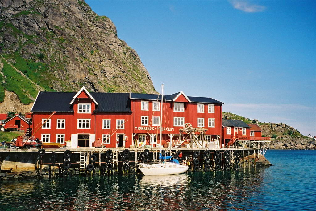 Tørrfiskmuseum i Å, Lofoten, Nordland